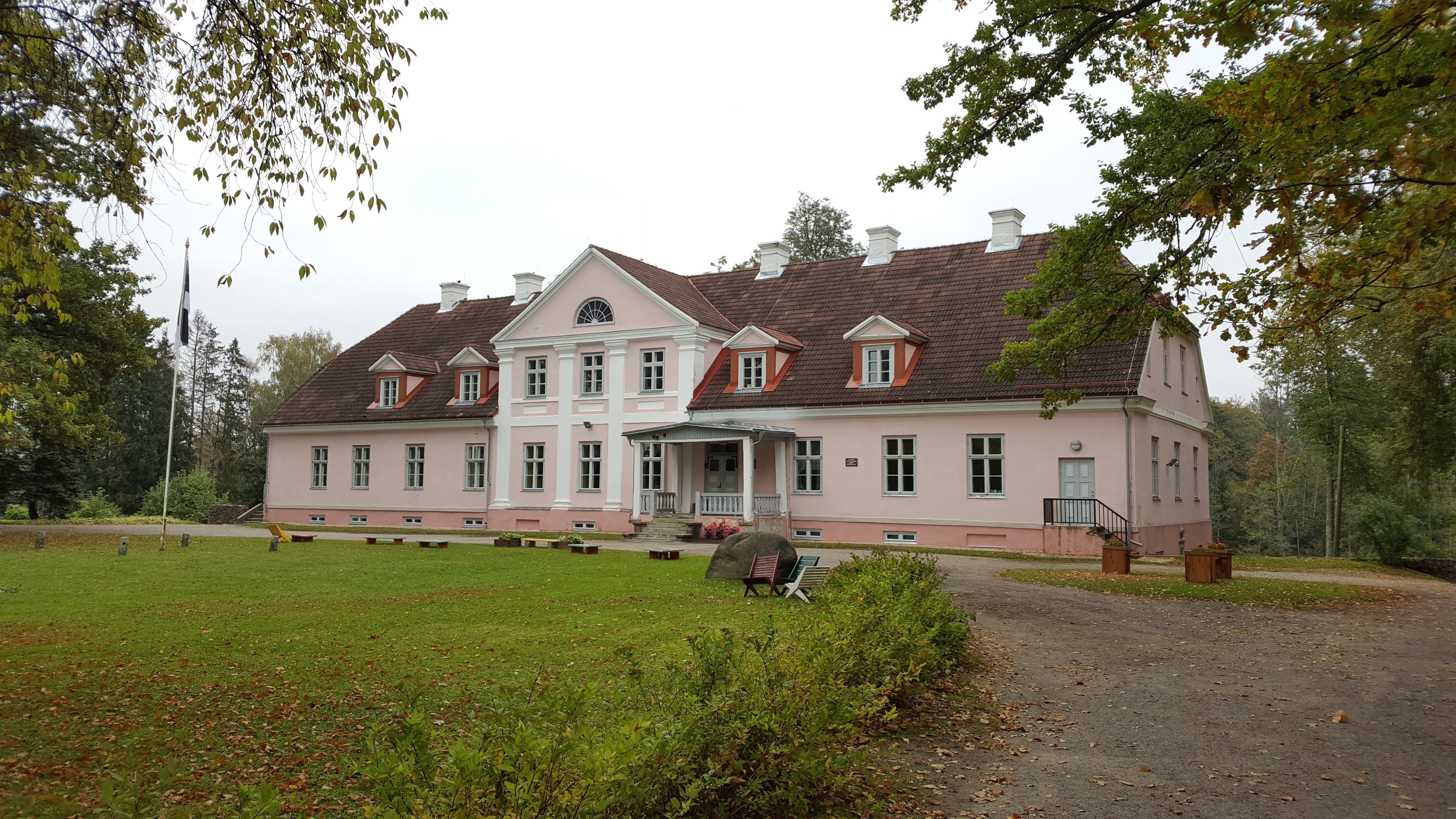 Lahmuse mõisa härrastemaja 2017. aastal.